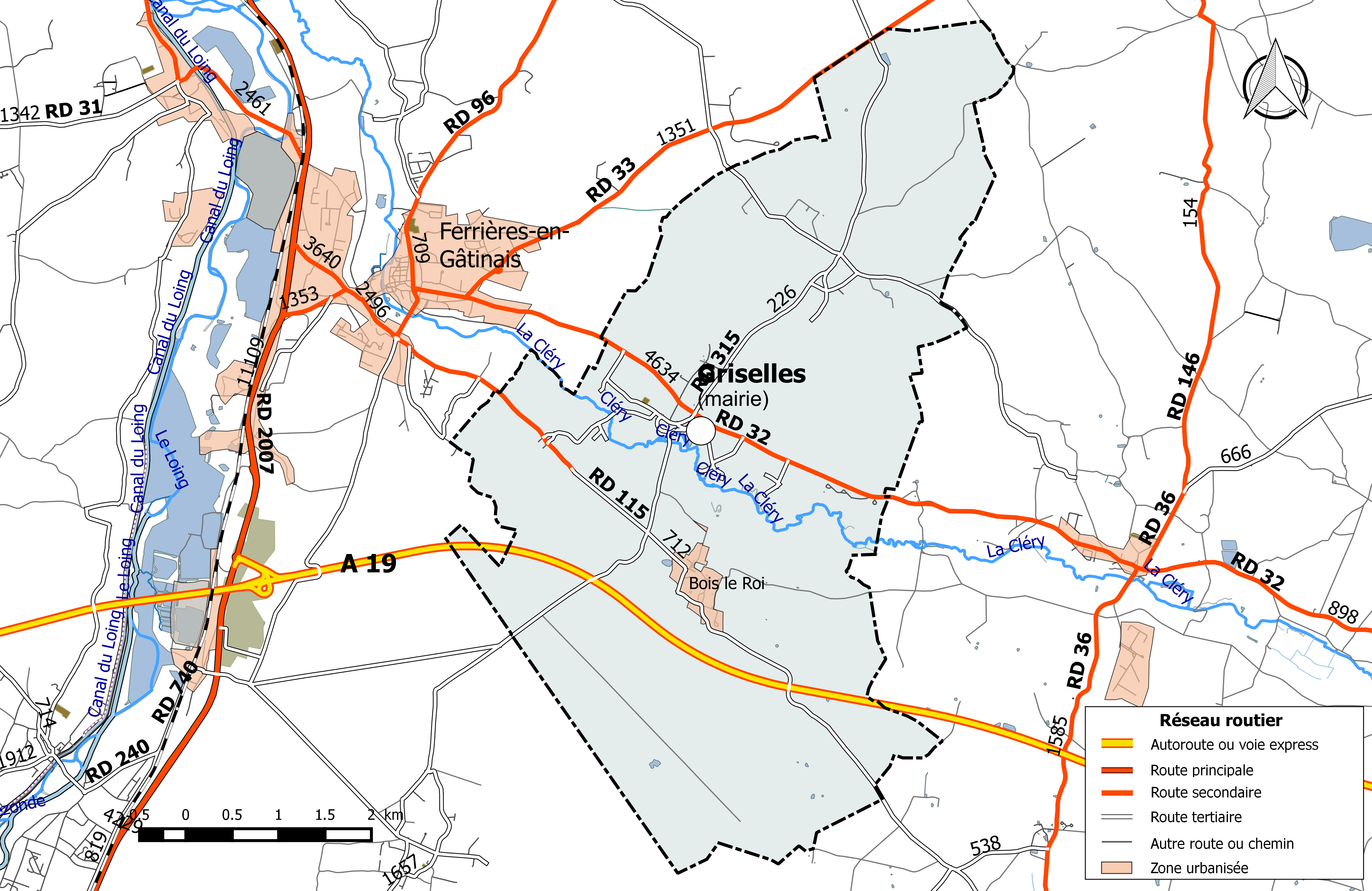 Carte du réseau routier de la commune de Griselles (Loiret).